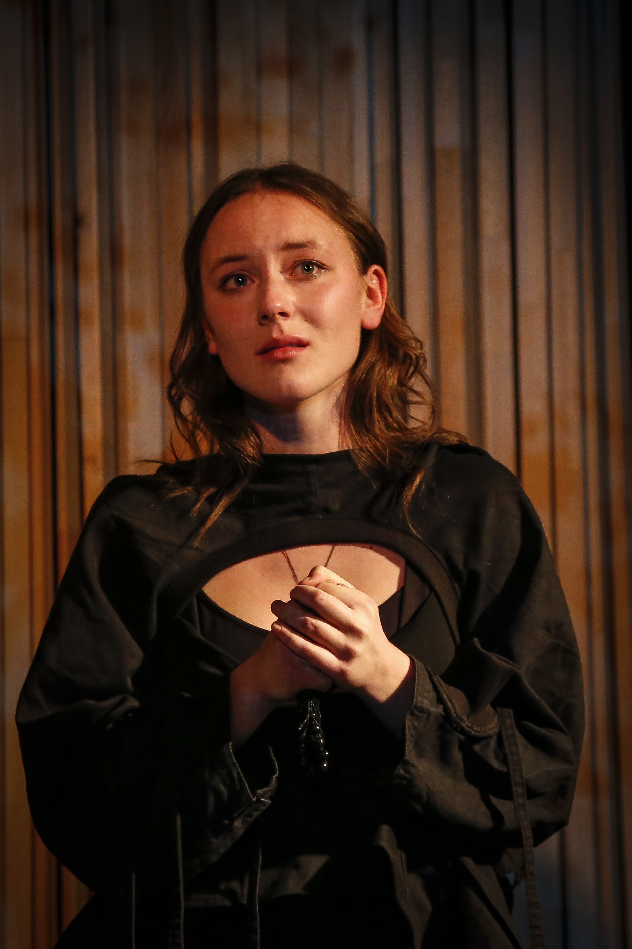 Спектакль-коллаж по произведениям Шекспира в театре С.А.Д. (Аптекарский огород).